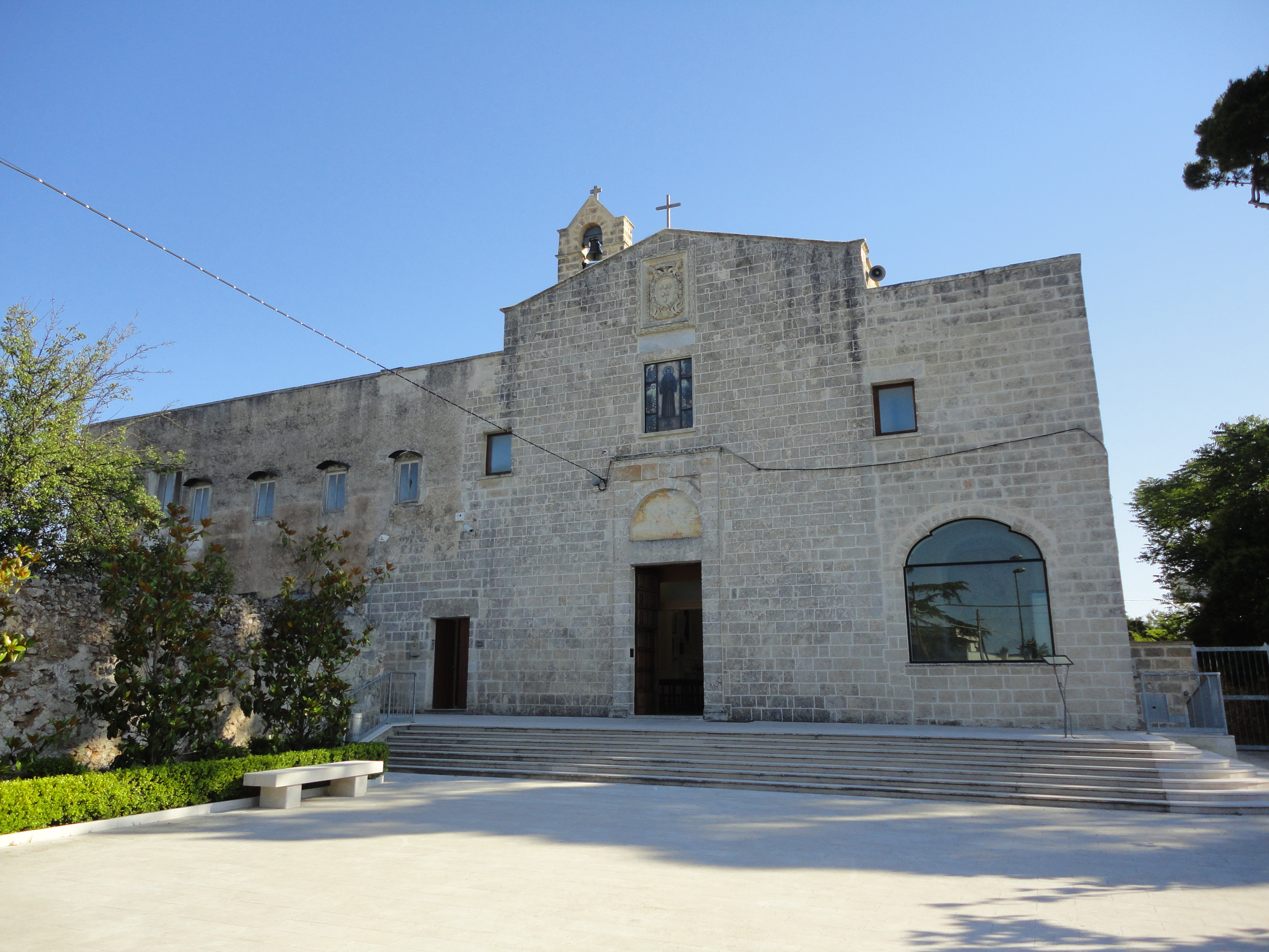 Chiesa di San Francesco Cappuccini Galatone, Lecce